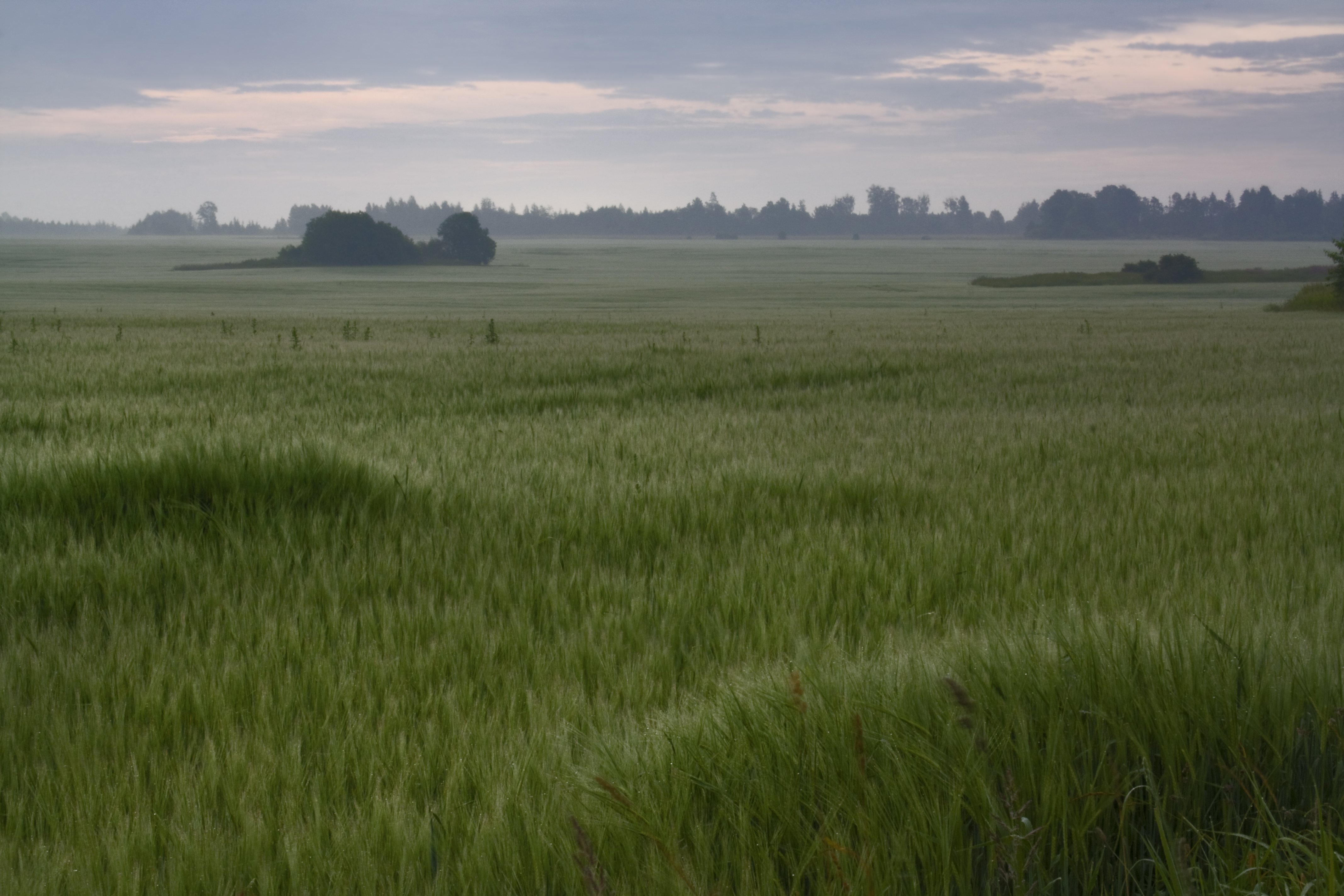 Agrotehnika eiramine tekitab saagise kadu.Rammututid odra põllul tulenevad ebaühtlasest väetamisest ja ei võimalda vilja ühtlast valmimist